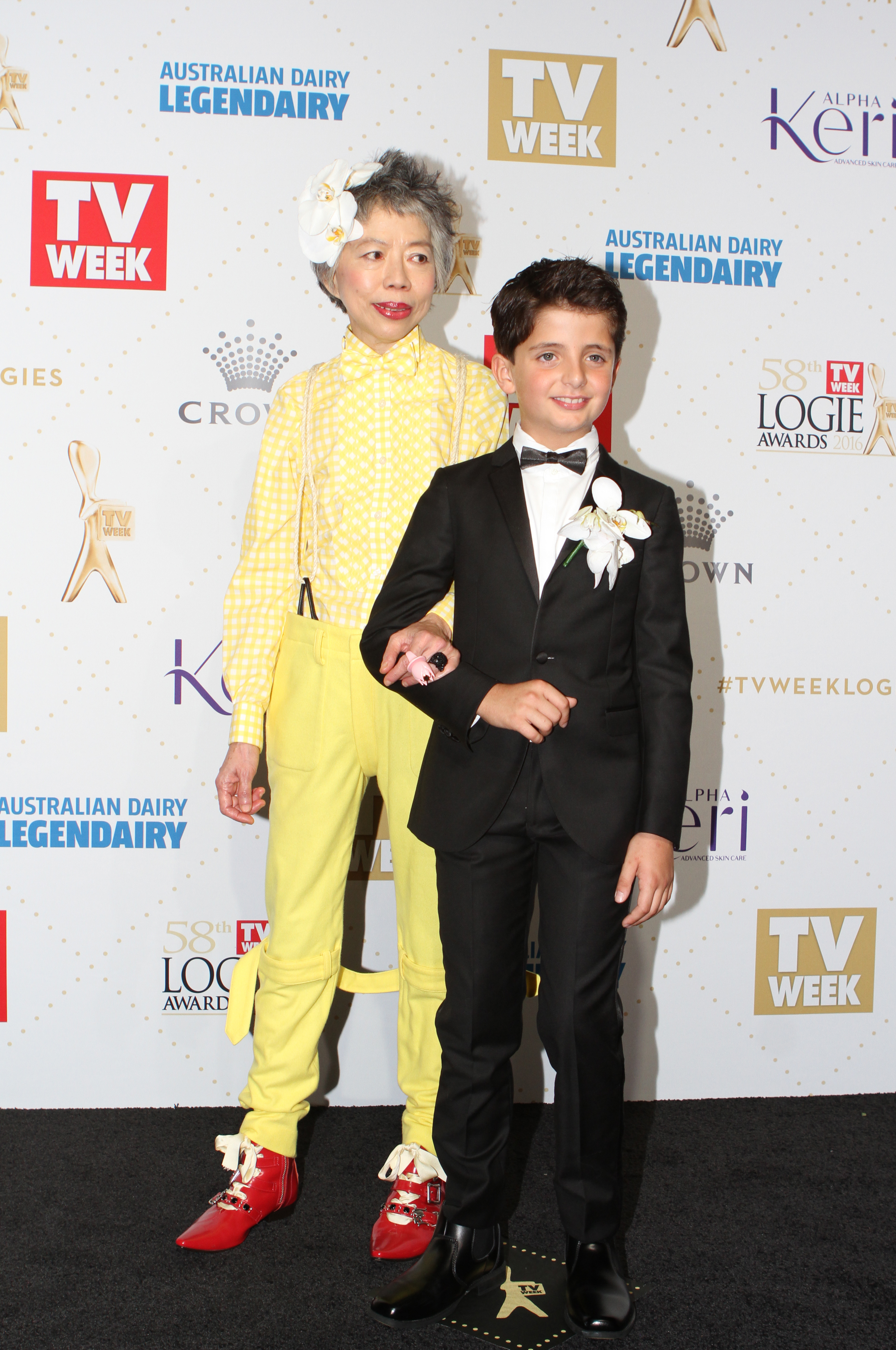 Lee Lin Chin 2016 TV Week Logie Awards